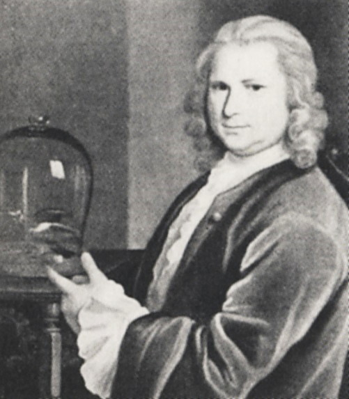 Mårten Triewald (1691-1747), svensk uppfinnaretitle QS:P1476,sv:"Mårten Triewald (1691-1747), svensk uppfinnare" label QS:Lsv,"Mårten Triewald (1691-1747), svensk uppfinnare"